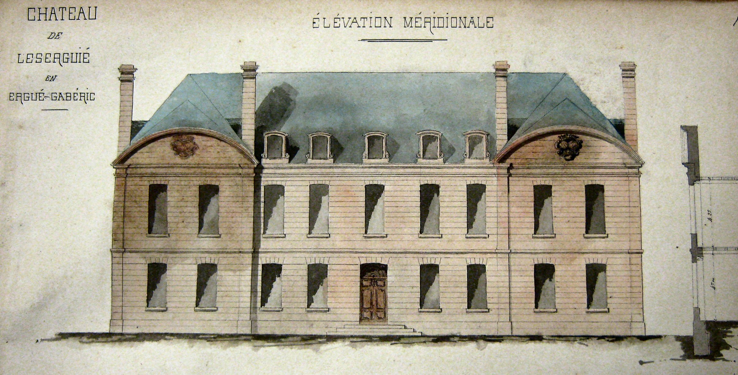 Plan, établi en 1884, de la façade du château de Lézergué en Ergué-Gabéric, par l'architecte Joseph Bigot, pour le compte de François Louis de la Marche et Marie Anne du Botmeur (archives de l'évêché de Quimper)